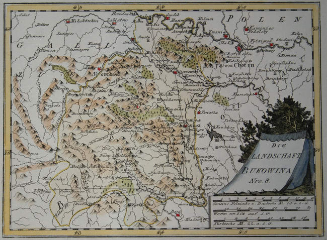 Die Landschaft Bukowina. Nro. 8. Kolorierter Kupferstich, 21 × 28,5 cm